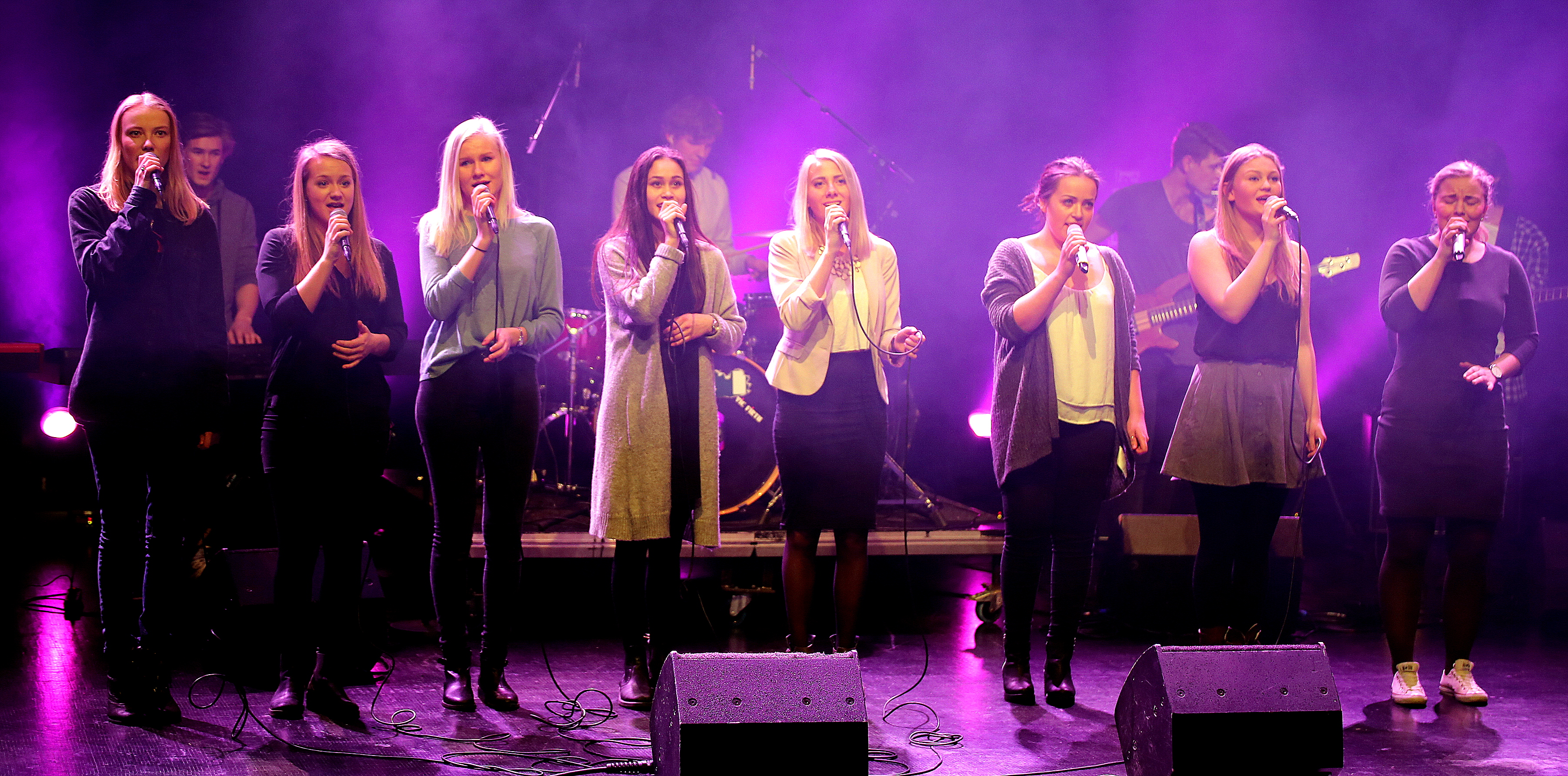 Fagbrevutdeling 2015